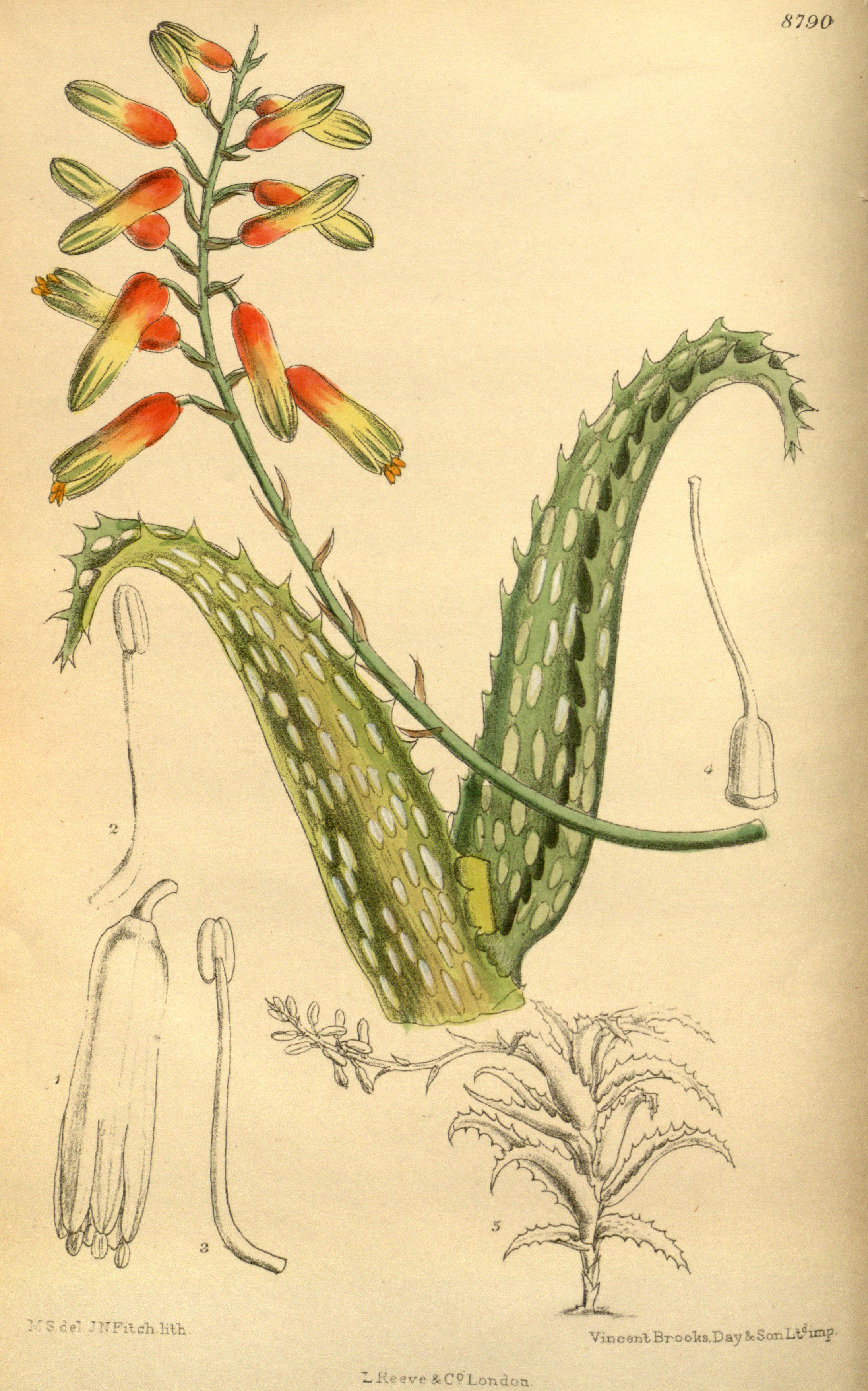 Aloe concinna (= Aloe squarrosa), Xanthorrhoeaceae, Asphodeloideae